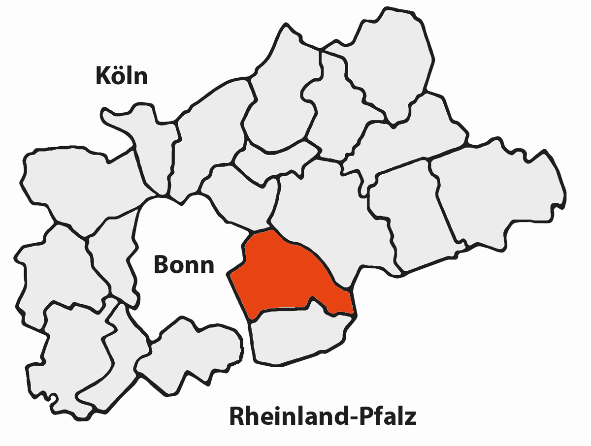 Lage von Königswinter im Rhein-Sieg-Kreis